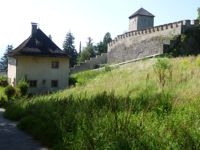 Paris-Lodron-Zwinger_Weinstöckl-Sperrturm_mit_Blick_auf_die_Richterhöhe